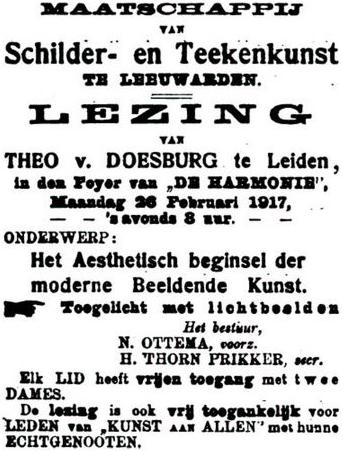 Advertentie van de lezing ‘Het aesthetisch beginsel der moderne kunst’ van Theo van Doesburg. Afkomstig uit Leeuwarder Courant, 166e jaargang, nummer 46 (vrijdag 23 februari 1917): [p. 7].